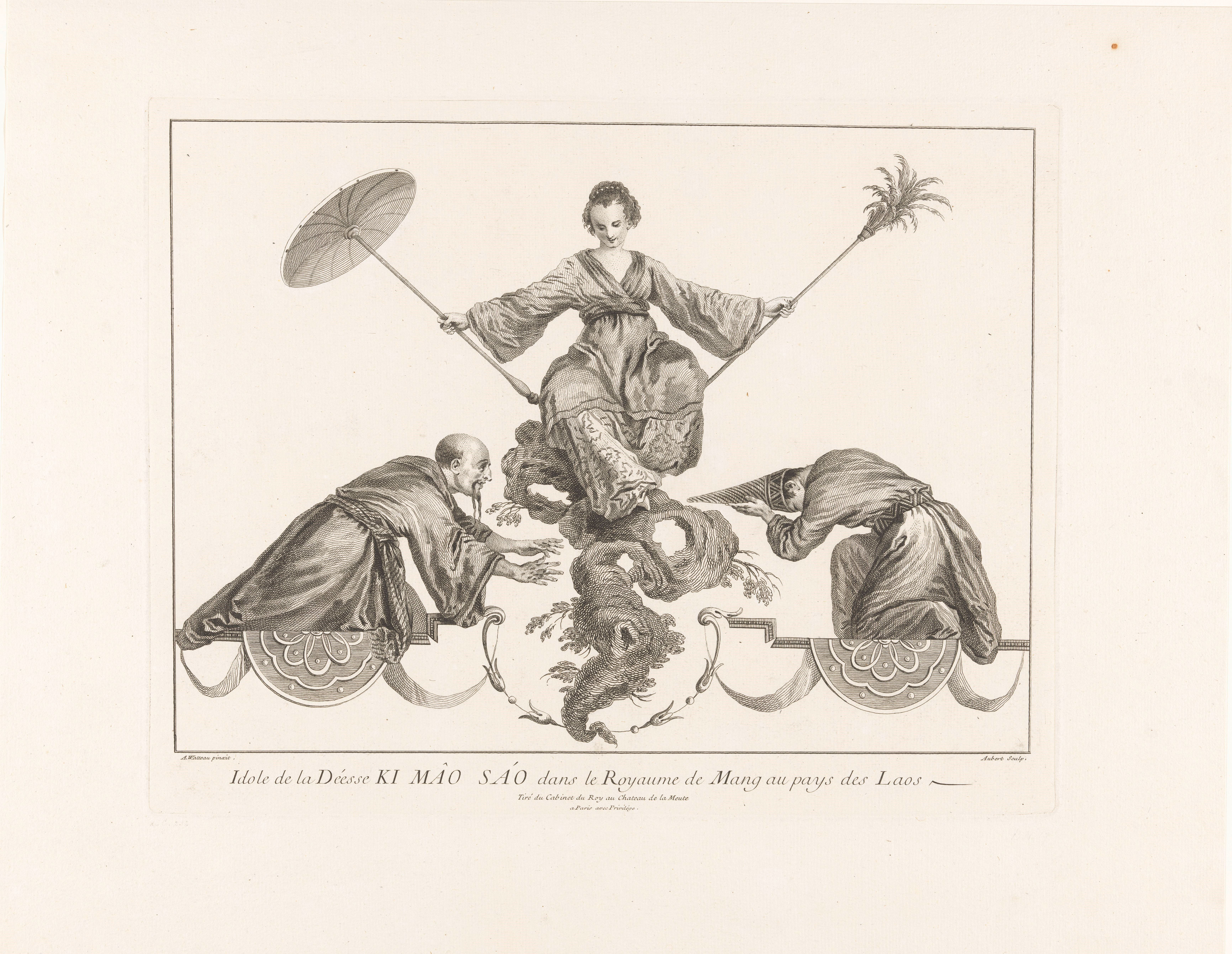 IdentificatieTitel(s): Godin geflankeerd door twee biddende figurenIdole de la Déesse Ki Mâo Sáo dans le Royaume de Mang au pays de Laos (titel op object)Serie van Aziatische taferelen uit de collectie van het Château de la Muette (serietitel)Figures chinoises et tartares du château de la Muette (serietitel)Objecttype: prent Objectnummer: RP-P-OB-4213Catalogusreferentie: IFF 18e siècle 19Nagler/Meyer 51LeBlanc 77VervaardigingVervaardiger: prentmaker: Michel Aubert (vermeld op object)naar schilderij van: Jean Antoine Watteau (vermeld op object)uitgever: weduwe François Chéreau (I)uitgever: Louis Surugueverlener van privilege: Lodewijk XV (koning van Frankrijk) (vermeld op object)Plaats vervaardiging: prentmaker: Frankrijknaar schilderij van: Frankrijkuitgever: Parijsuitgever: Parijsverlener van privilege: ParijsDatering: 1731Fysieke kenmerken: ets en gravureMateriaal: papier Techniek: etsen / graveren (drukprocedé)Afmetingen: plaatrand: h 322 mm × b 405 mmOnderwerpWat: kneeling figurerepresentations ~ goddesses, demi-goddesses, heroines, etc. (non-Christian religions)parasol, sunshadeWaar: LaosVerwerving en rechtenVerwerving: onbekend 2006Copyright: Publiek domein